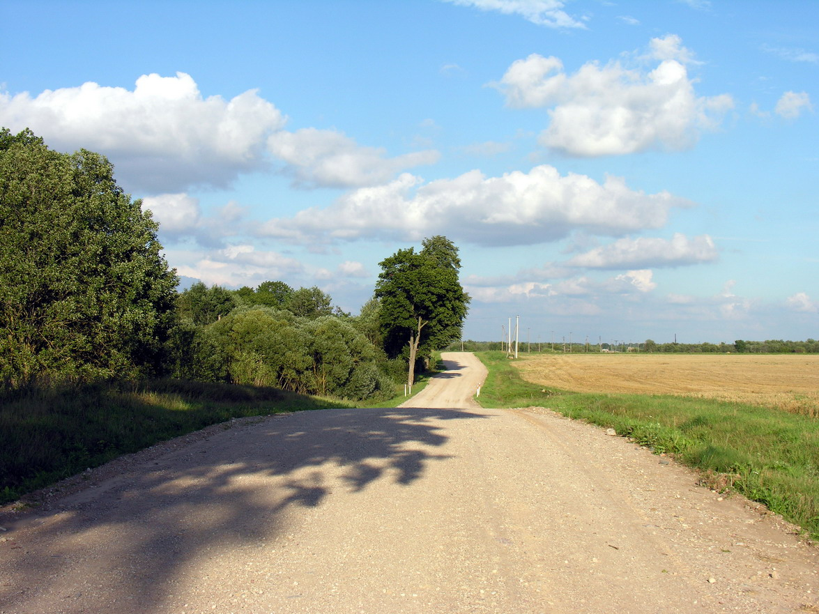 Dargužiškiai, Mažeikių rajonas, Viekšnių seniūnija Vieškelis per Dargužiškių kaimą iš Tučių į Kapėnus Foto: Algirdas, 2006 m. rugpjūčio 20 d., Lietuva